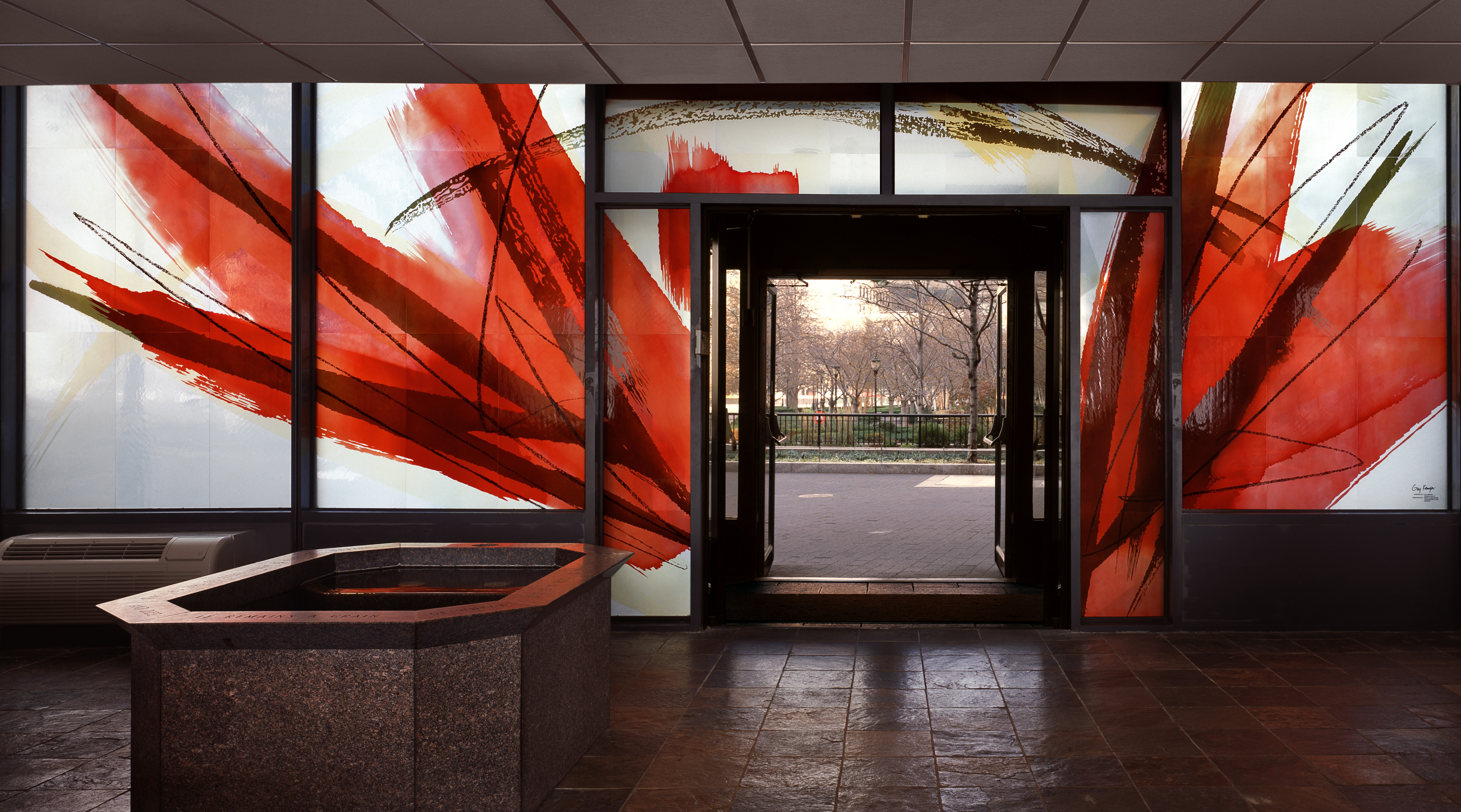 Glasfenster "Rise" St. Joseph's Chapel Ground Zero